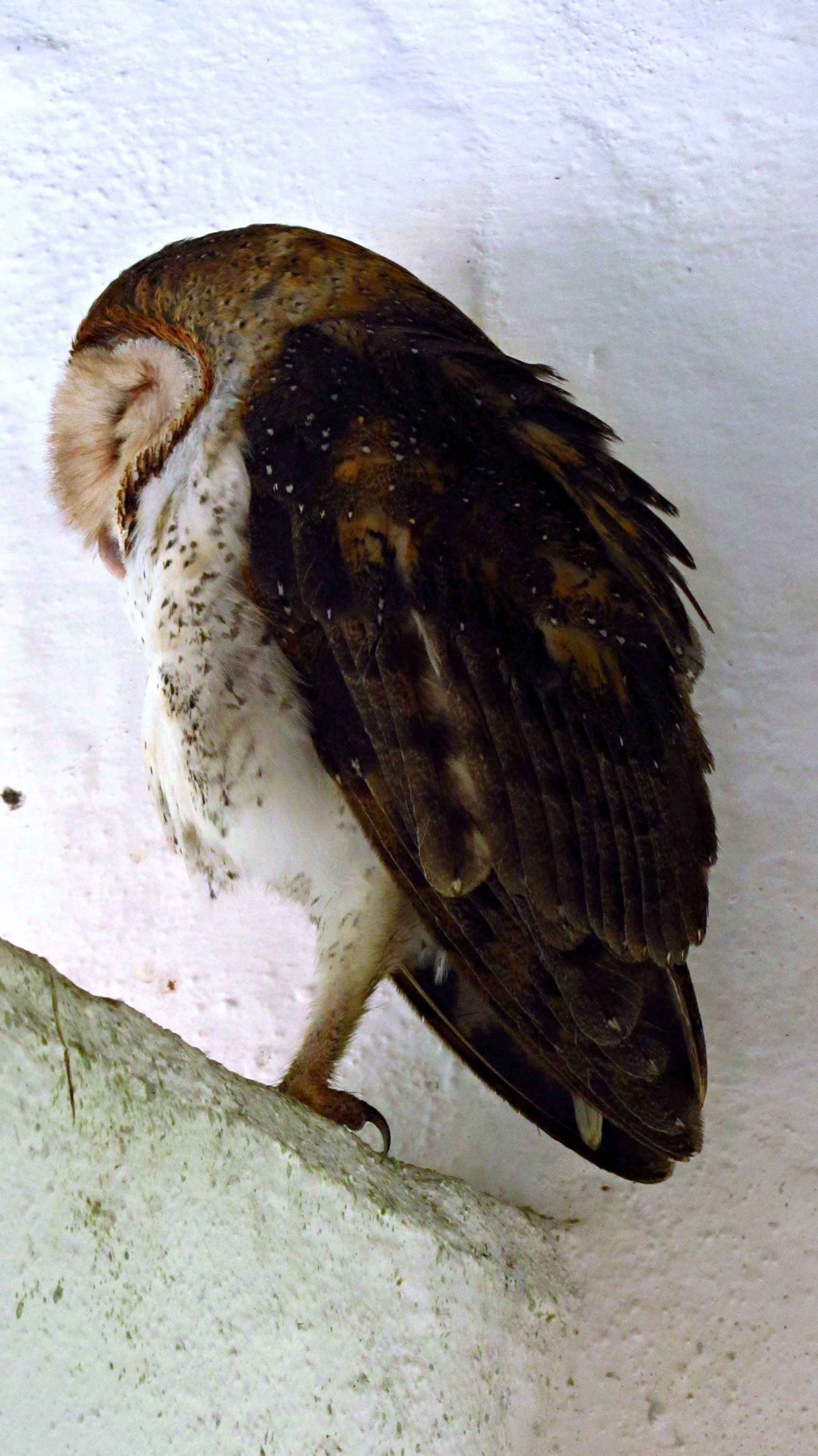 Galapagos Barn Owl Tyto alba punctatissima, Santa Cruz Island, Galapagos Islands.